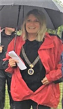 Frederikshavns borgmester Birgit Hansen den 23. juni 2016 holder båltale Sct. Hans aften i Haldbjerg